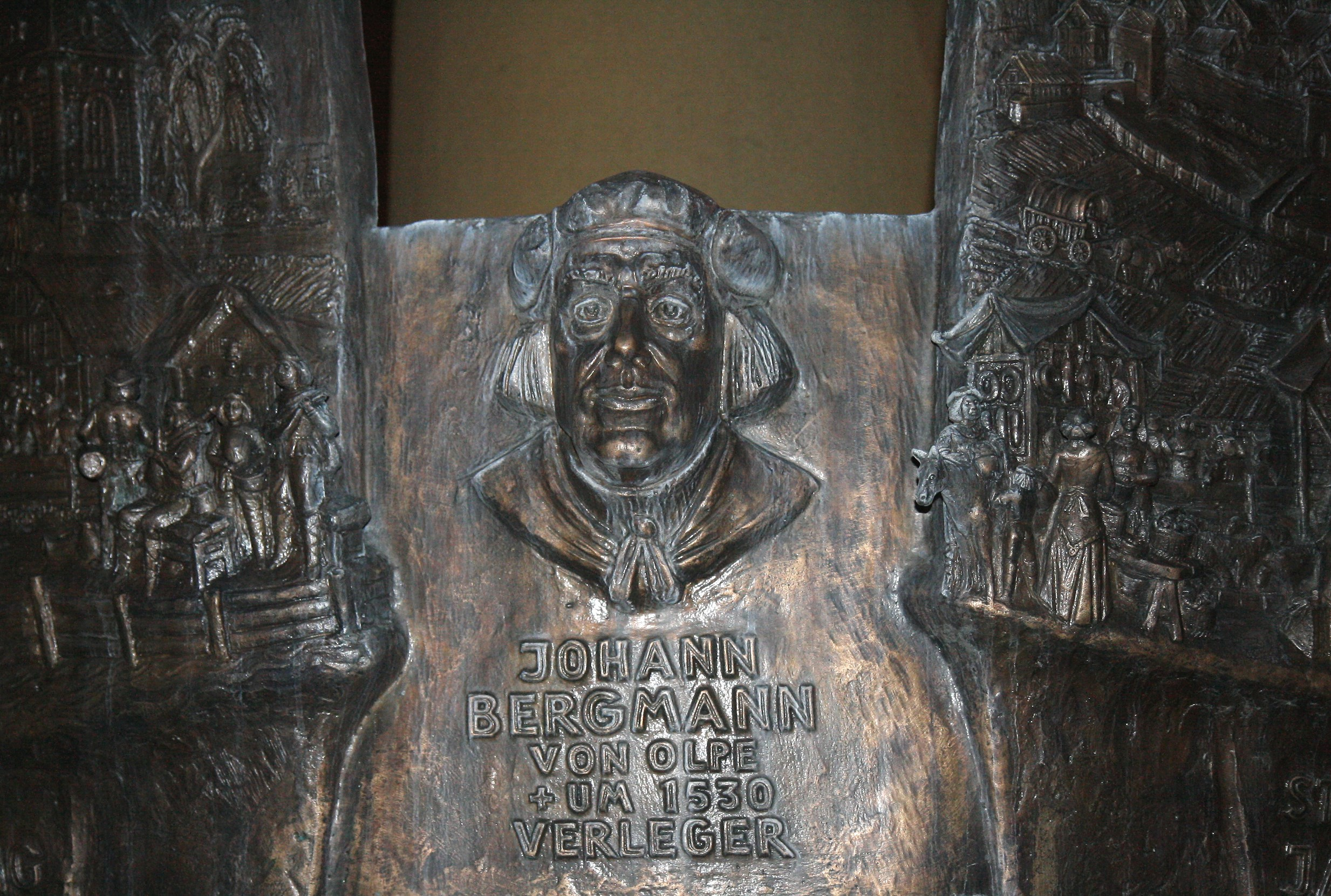 Geschichtsbrunnen am Kurkölner Platz in Olpe. Relief Johann Bergmann von Olpe.